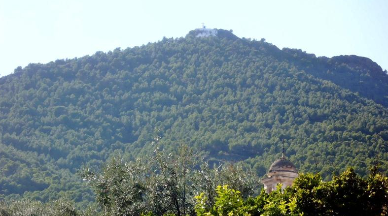 Vistas del Cerro Chinchirina desde Pinos del Valle